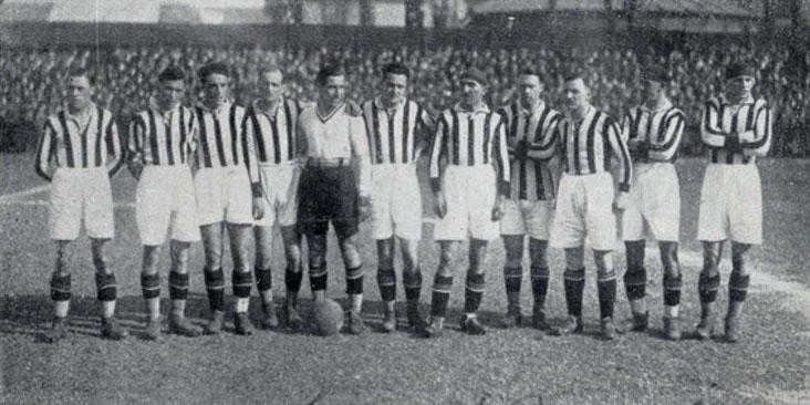 Una formazione della Juventus nella stagione 1927-28.